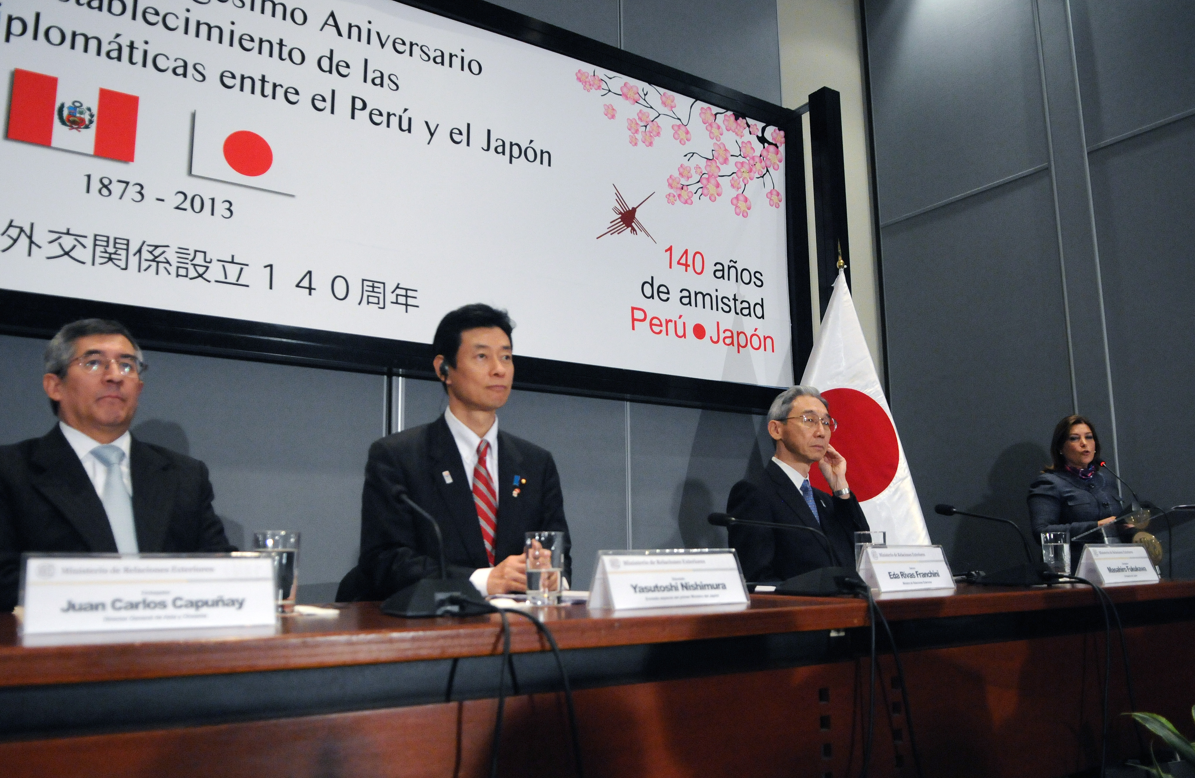 Como parte de las actividades para conmemorar el “Centésimo Cuadragésimo Aniversario del Establecimiento de las Relaciones Diplomáticas entre el Perú y el Japón”, la Ministra de Relaciones Exteriores, Eda Rivas Franchini, encabezó hoy, en la sede de la Cancillería, una ceremonia oficial que contó con la presencia del Diputado japonés Yasutoshi Nishimura, Enviado Especial del Primer Ministro Shinzo Abe; y del Embajador de Japón en el Perú, Masahiro Fukukawa, entre otras altas autoridades, empresarios japoneses y miembros de la comunidad nipona en nuestro país. Sigue leyendo la nota en nuestra Web: bit.ly/1bTKnyZ